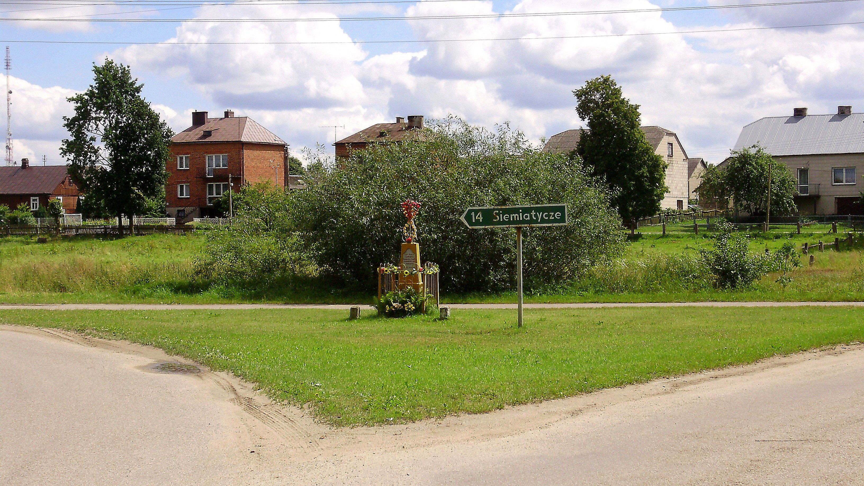 Betonowy postument z krzyżem przy wyjeździe ze wsi Makarki (województwo podlaskie, gmina Grodzisk). Sporządzony na postumencie cyrylicki napis informuje, iż obiekt został umieszczony w tym miejscu 10 czerwca 1933 przez ówczesną młodzież wsi.